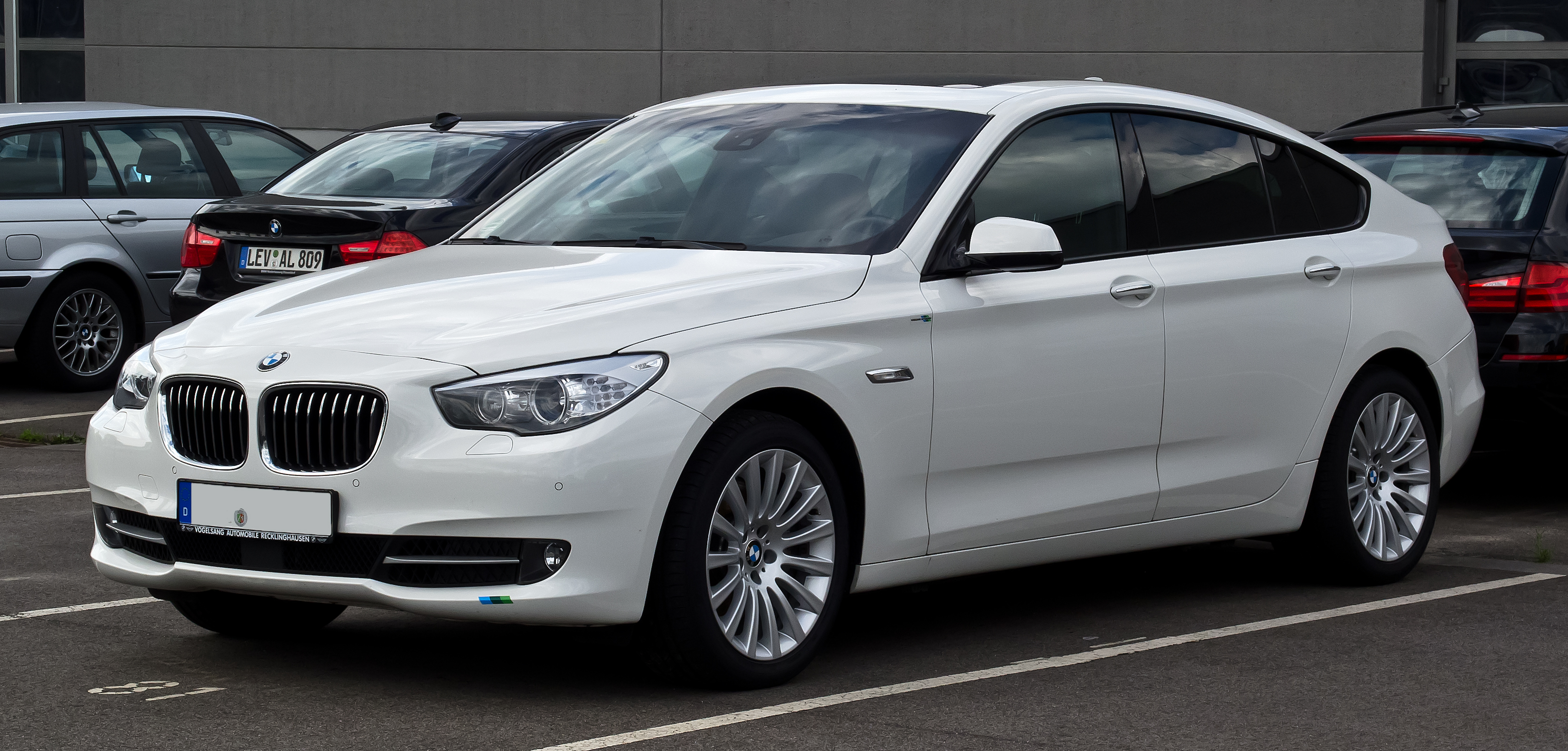 BMW 5er GT (F07)